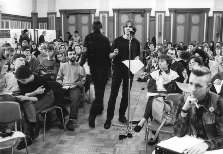 Berlin, Gründungskongress, "Junge Linke" ADN-ZB Franke 3.2.90 Berlin: Ihren Gründungskongreß hielt die marxistische Jugendvereinigung "Junge Linke" in der Carl-von-Ossietzky-Oberschule in Berlin-Pankow ab. Basisgruppen aus allen Teilen der DDR nahmen daran teil. Torsten Klatt (M.) erläuterte die Position der Jugendlichen seiner Gruppe von der Karl-Marx-Universität Leipzig. -siehe auch 1990-0203-11N